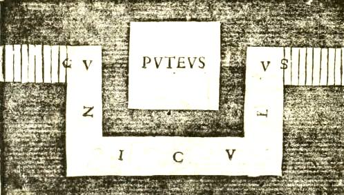 Cunicolo del Ferraro e pozzo 23 in un disegno di Raffaele Fabretti del 1683